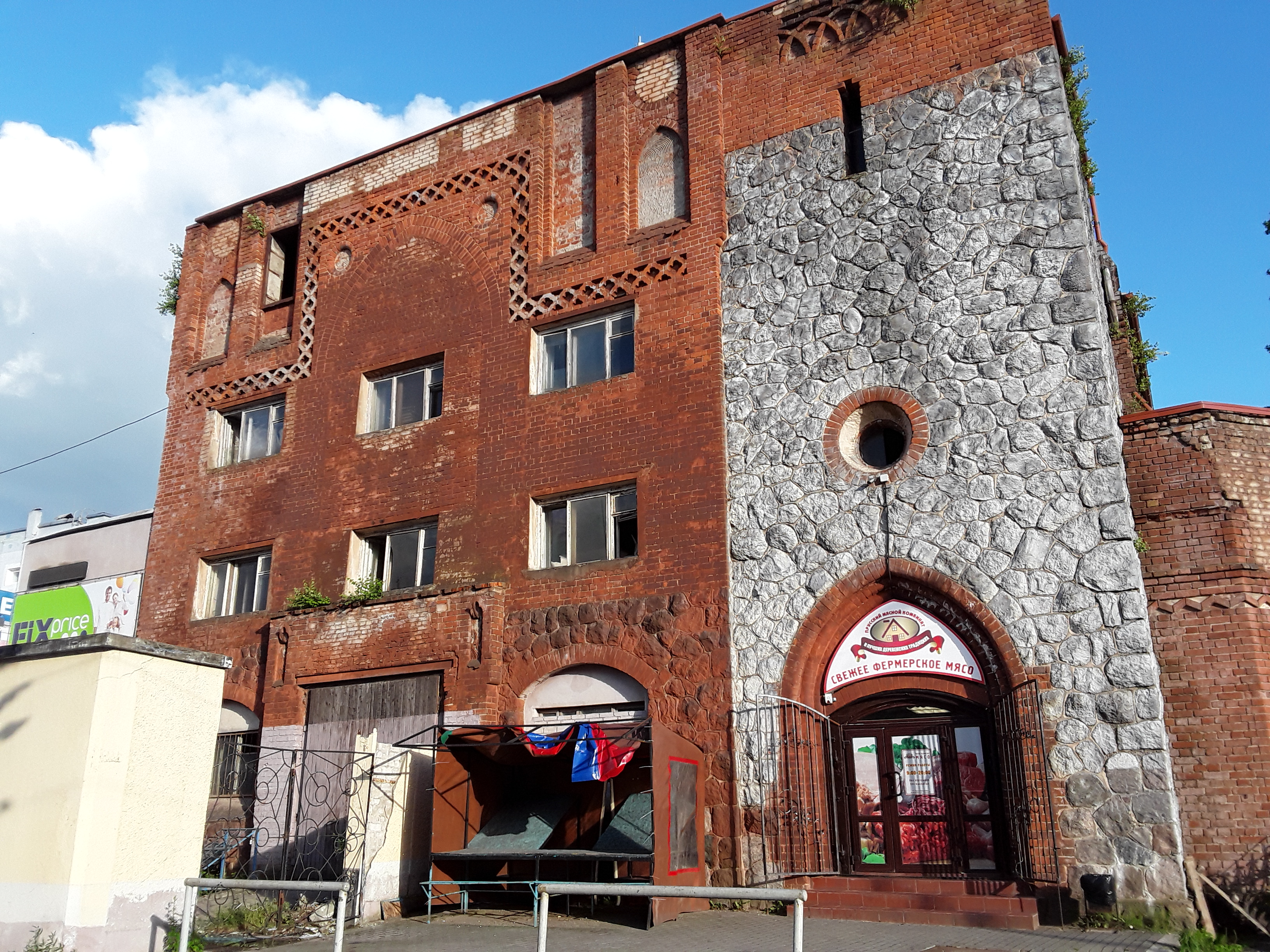 Frühere Kreuzkirche in Tilsit